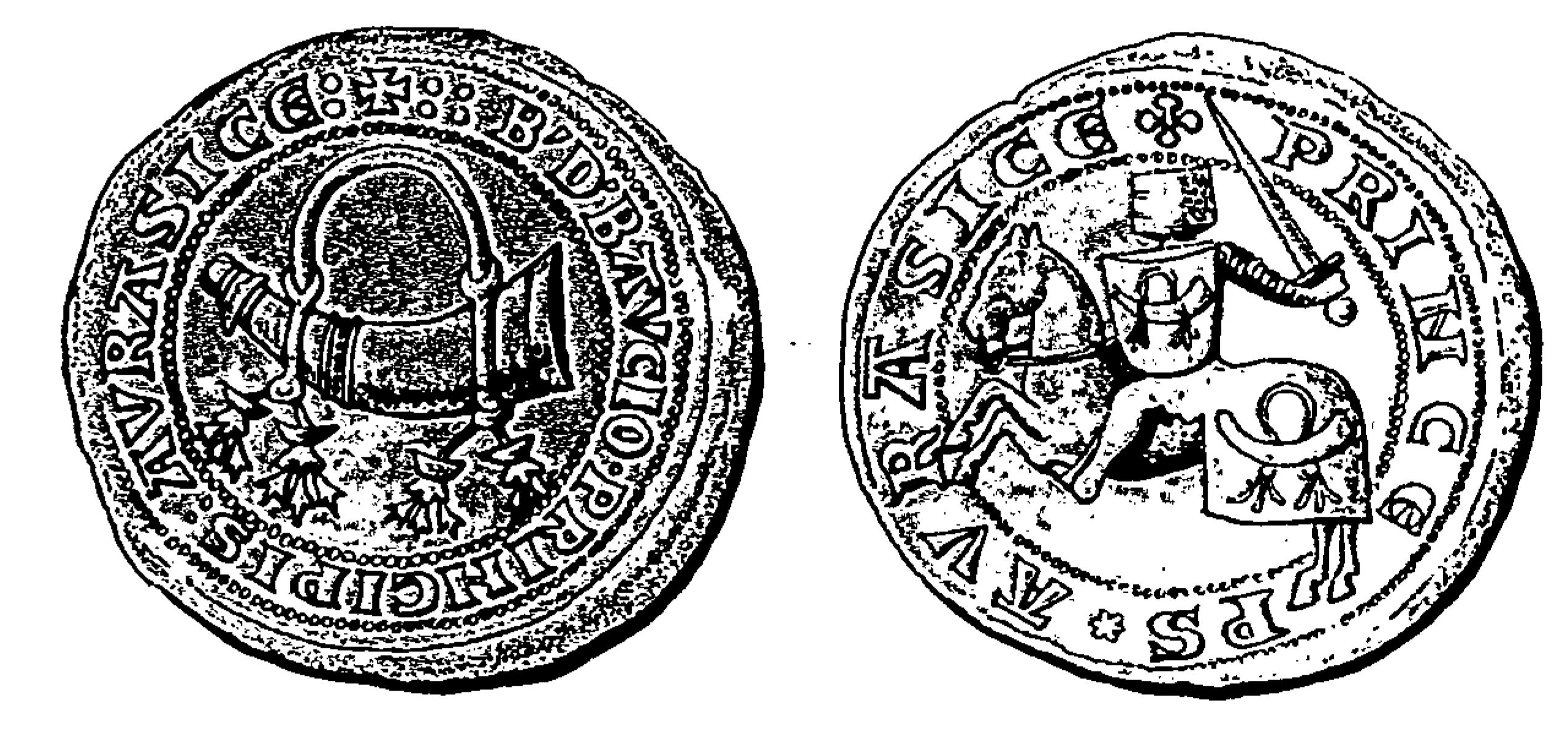 Sceau de Raymond IV des Baux